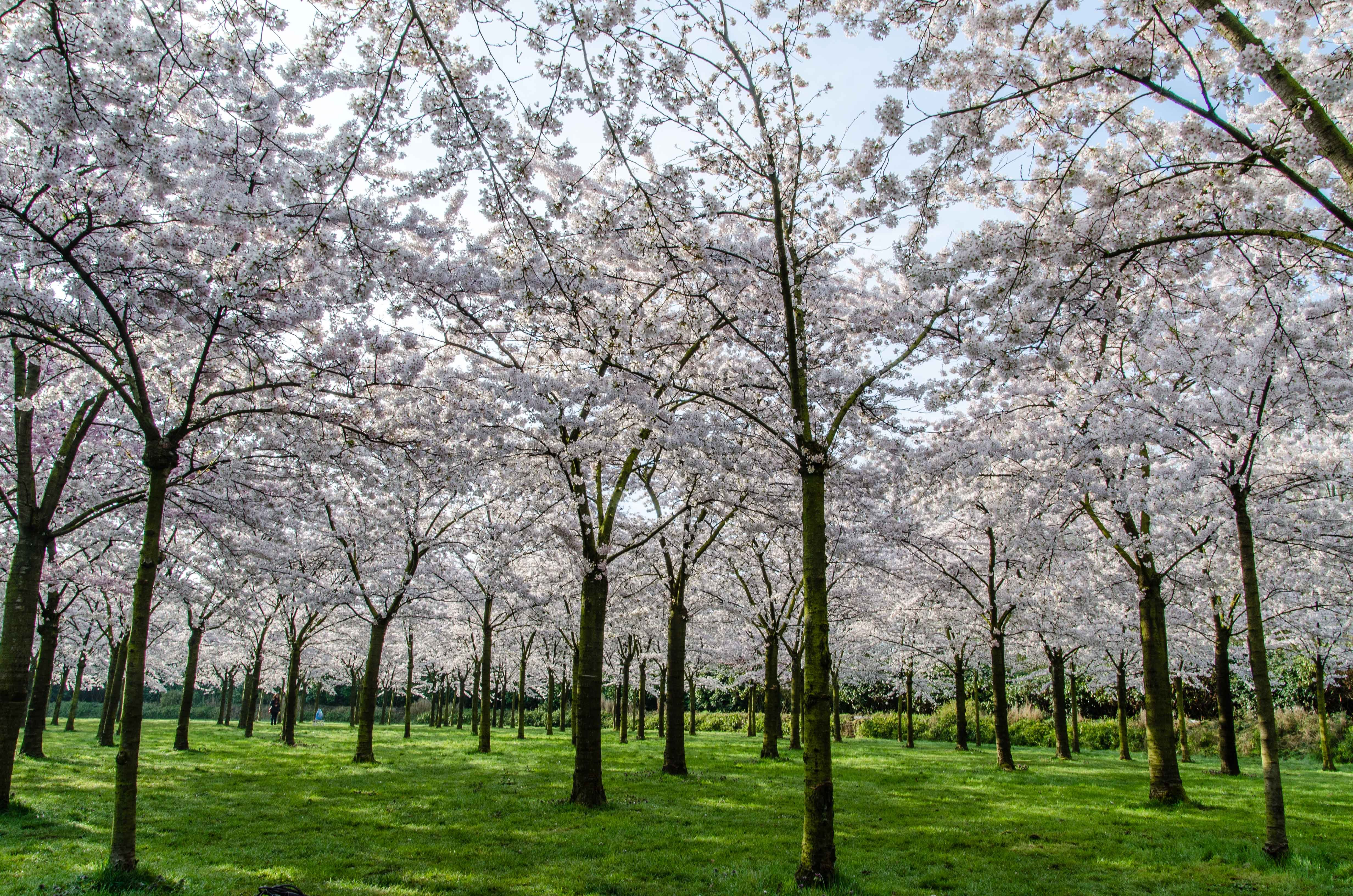 Zicht op een deel van het Kersenbloemsempark in het Amsterdamse Bos